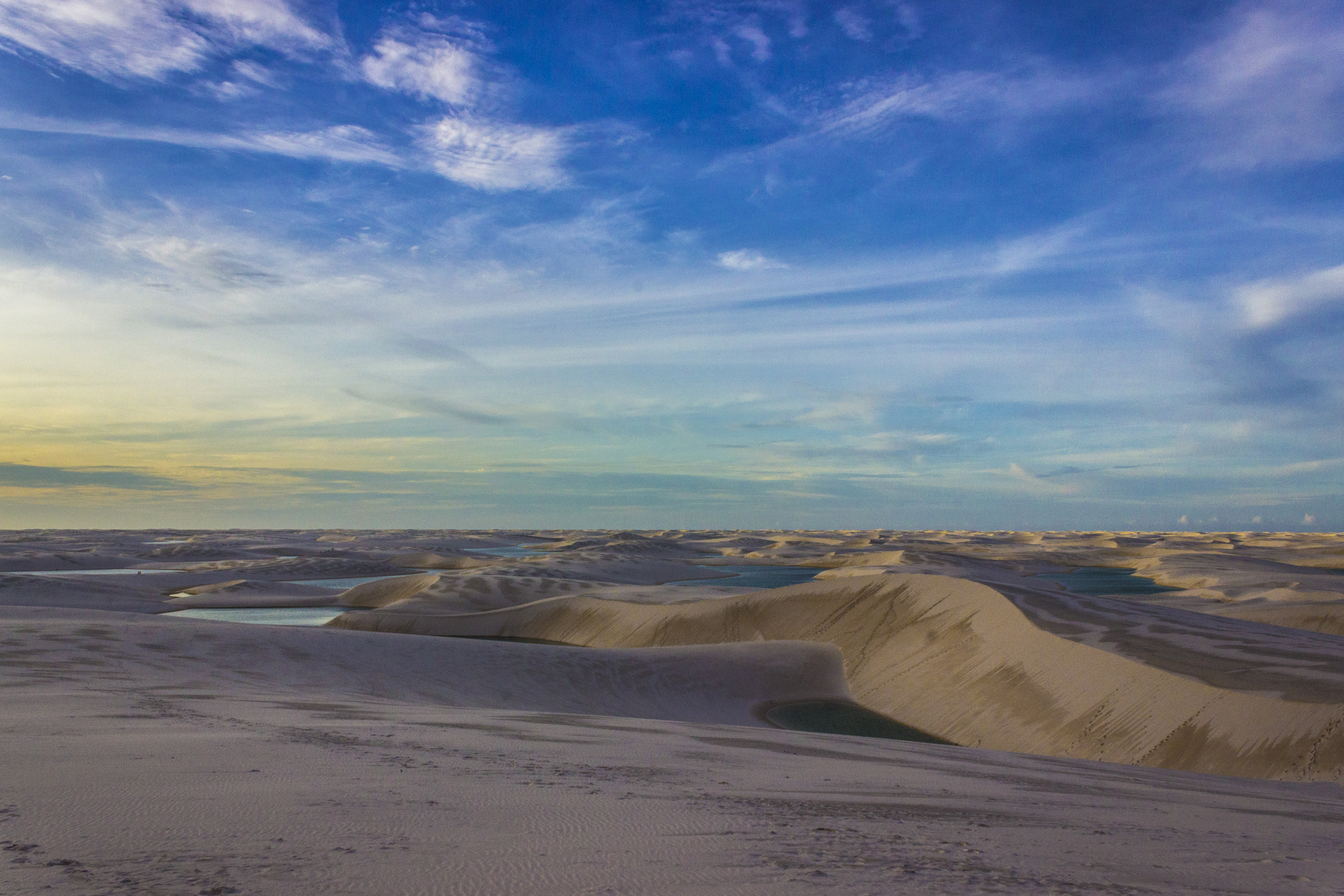 Outra perspectiva de várias lagoas formadas naturalmente pelas chuvas do estado de Maranhão